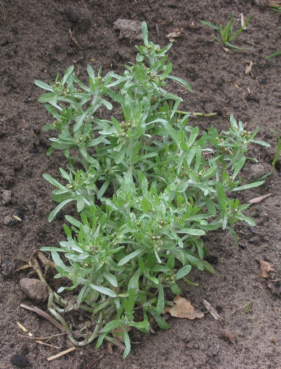 (nl: Moerasdroogbloem plant) Gnaphalium uliginosum